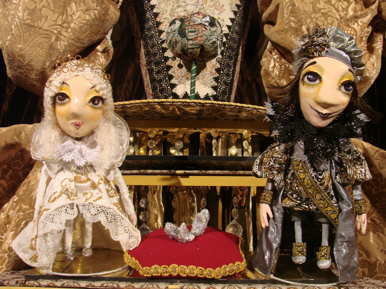 Крымский академический театр кукол на фестивале «Белгородская забава 2012». Спектакль «Золушка».